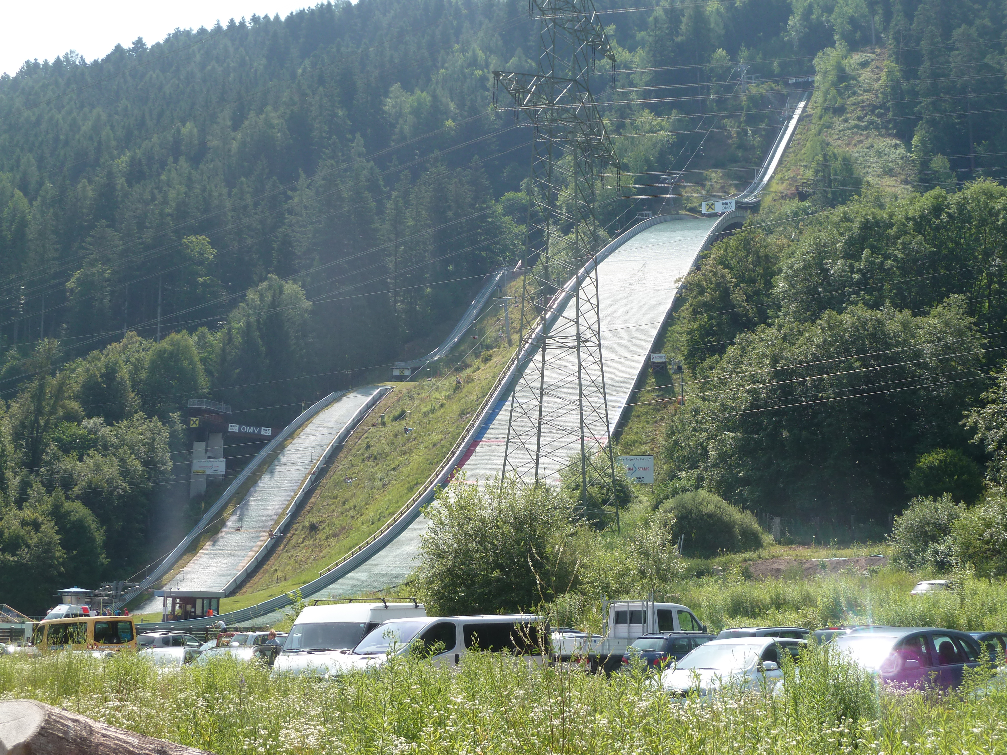 Brunnentalschanze im Juni 2012